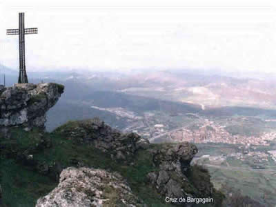 Bargagain in Altsasu.